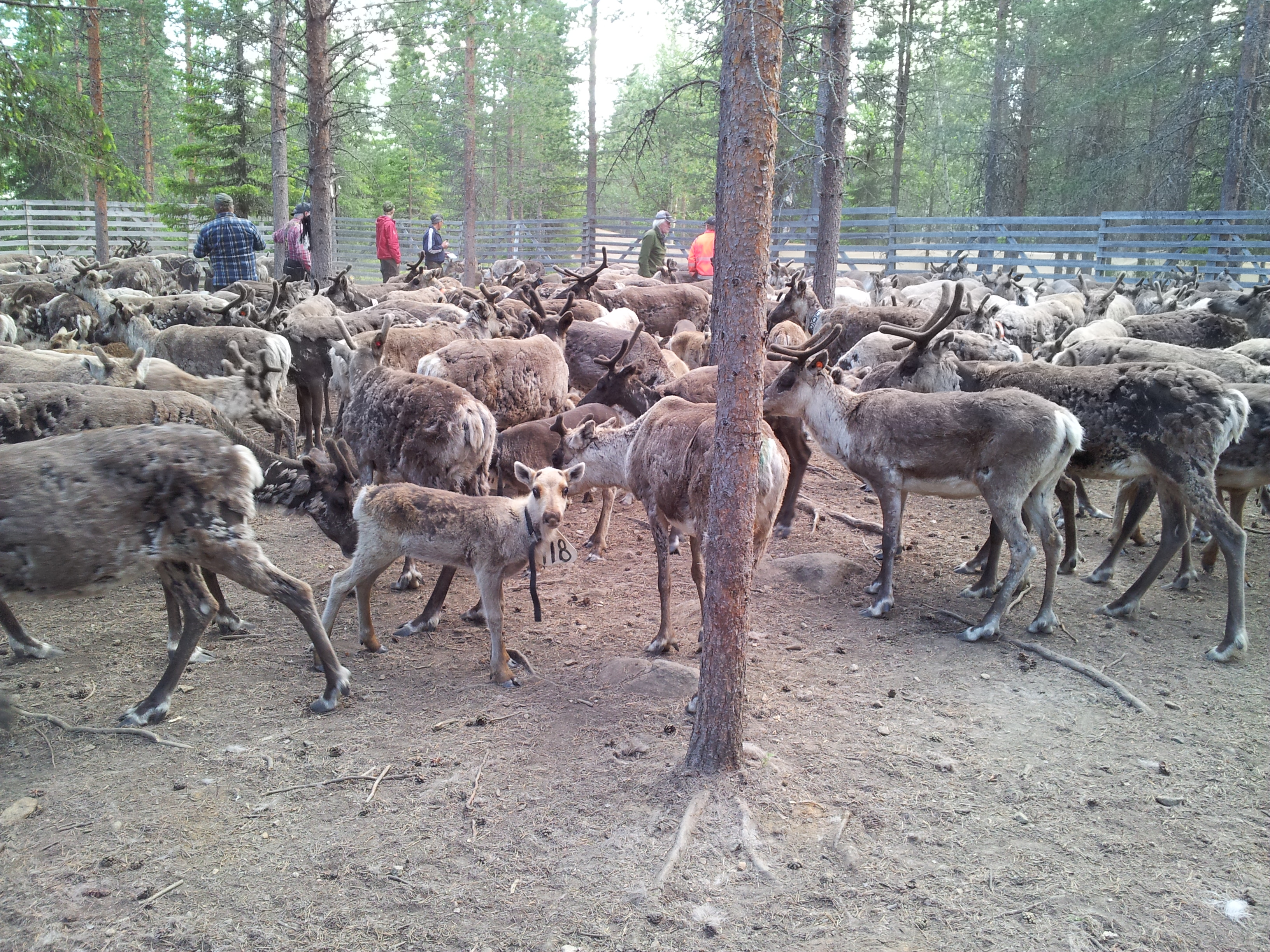 Samebyn är en ekonomisk förening som gemensamt organiserar skogsrenskötsel.